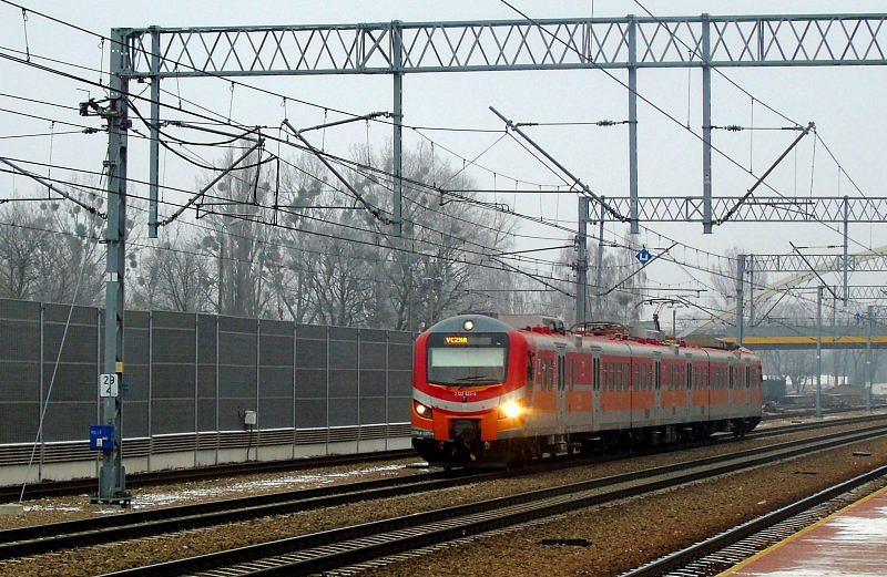 Zmodernizowany elektryczny zespół trakcyjny EN57ALd-2211, eksploatowany przez Przewozy Regionalne, przejeżdża przez Grodzisk Mazowiecki jako pociąg InterRegio relacji Warszawa Wschodnia - Łódź Fabryczna.